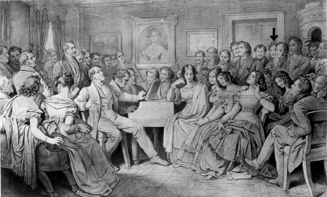 aus der Erinnerung gezeichnet Das Bild zeigt Franz Schubert am Klavier sowie Josef von Spaun, Johann Michael Vogl, Franz Lachner, Moritz von Schwind, Wilhelm August Rieder, Leopold Kupelwieser, Eduard von Bauernfeld, Franz von Schober, Franz Grillparzer und auf dem Bild an der Wand Komtess Karoline Esterházy.